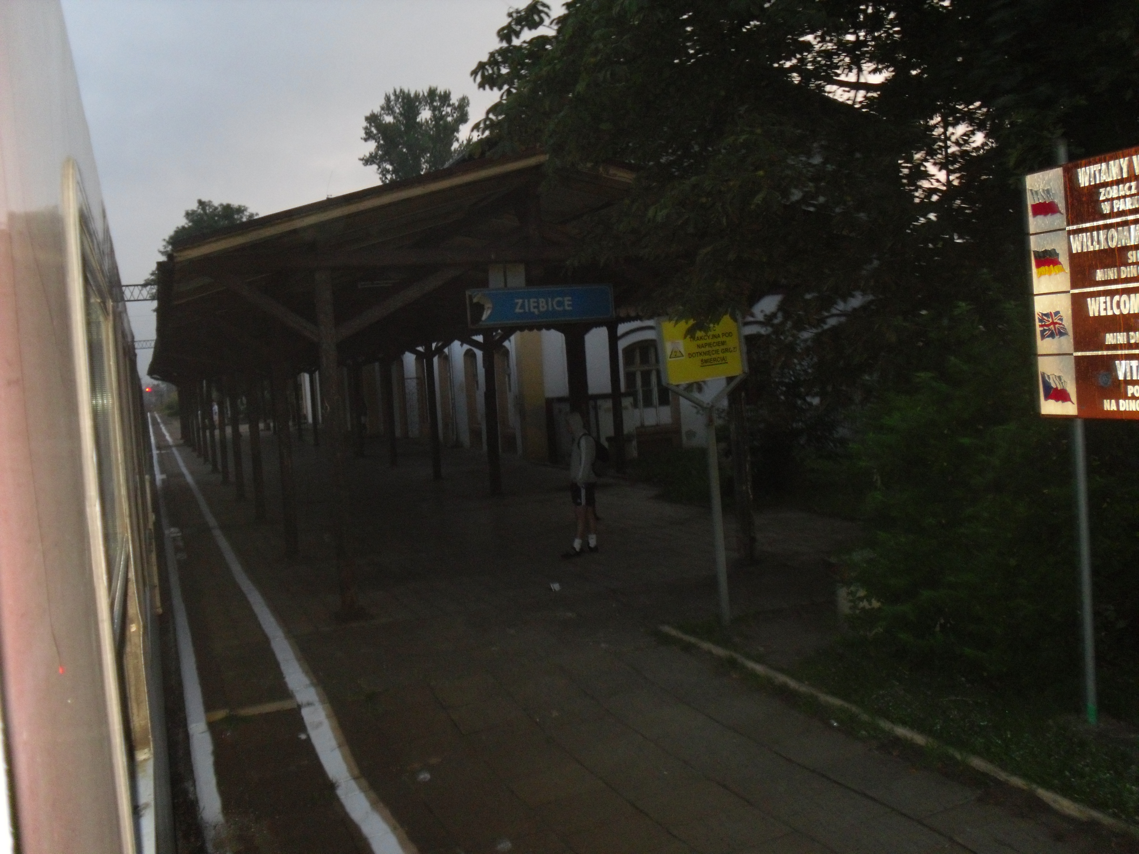 Peron w Ziębicach